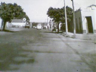 Cidade antigamente